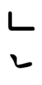 Korean Alphabet ㄴ(ni.eun)